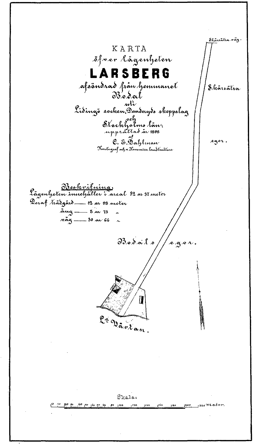 Larsbergs tomt upprättad 1898